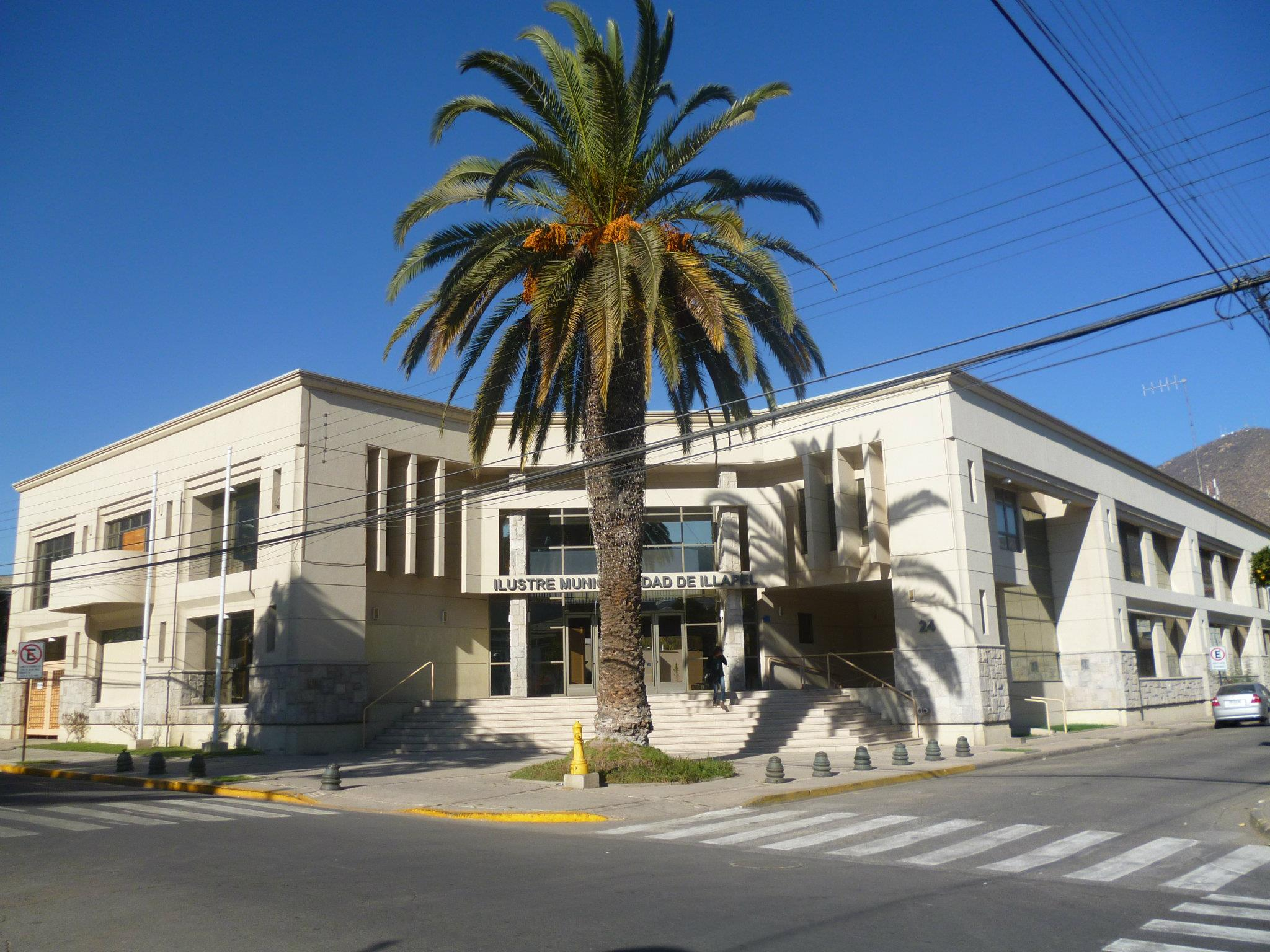 Nuevo edificio de la Ilustre Municipalidad de Illapel.